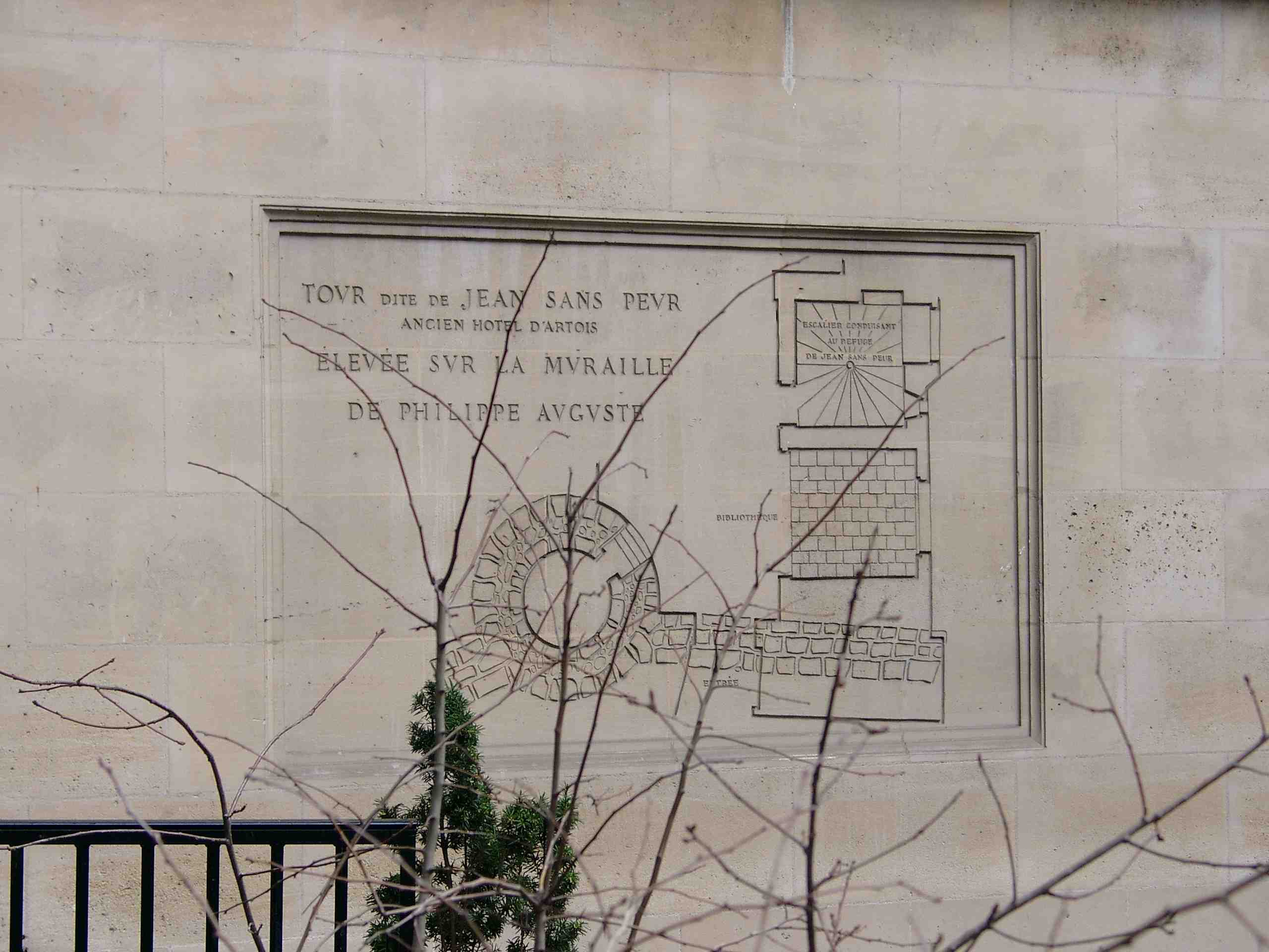 Paris, Hôtel de Bourgogne, Tour Jean sans Peur. TOUR DITE DE JEAN SANS PEUR ANCIEN HOTEL D'ARTOIS ÉLEVÉE SUR LA MURAILLE DE PHILIPPE AUGUSTE